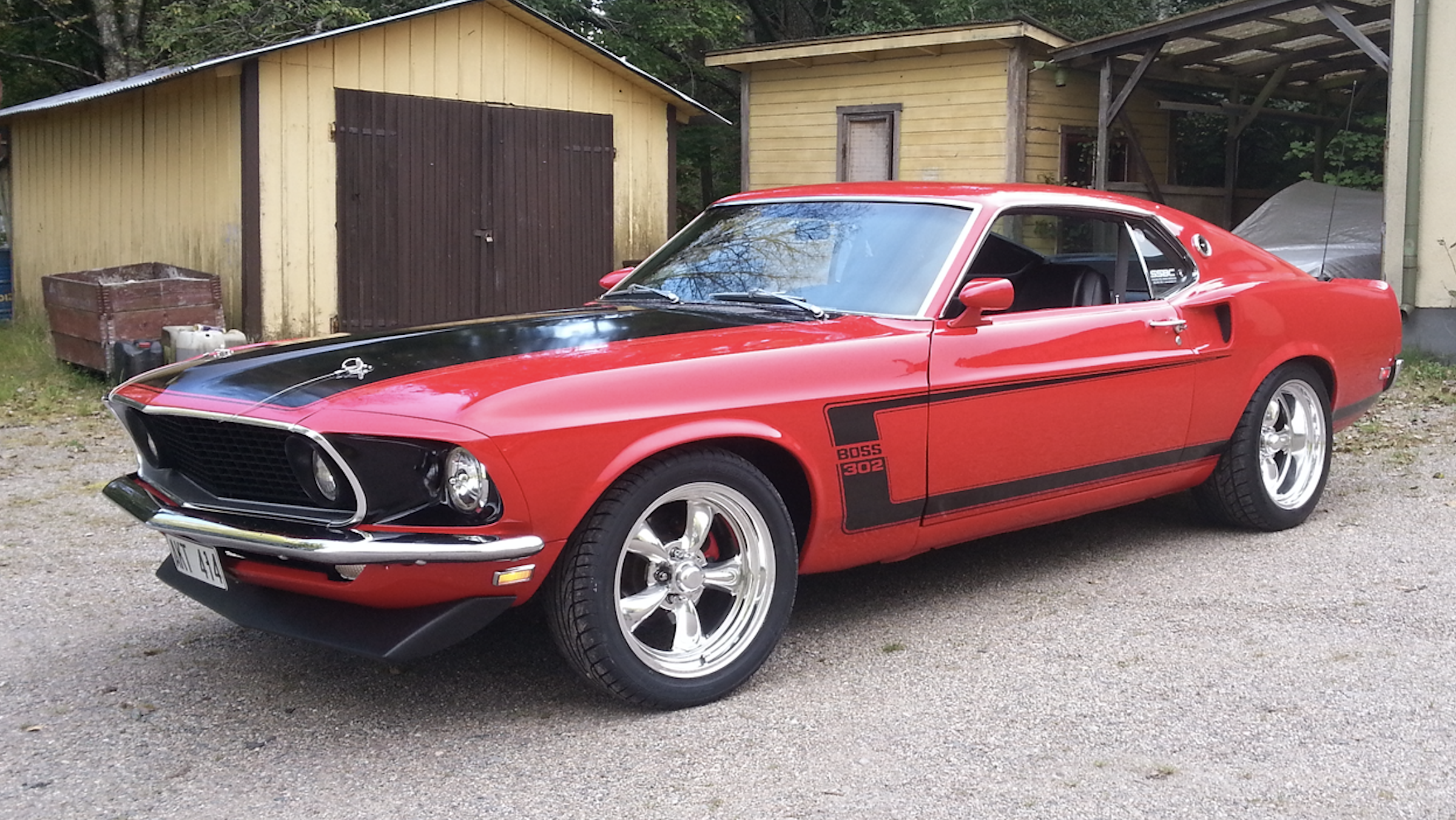 FORD MUSTANG 1969